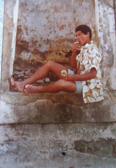 O músico Di Melo em foto tirada provavelmente nos anos 1970 ou 1980.